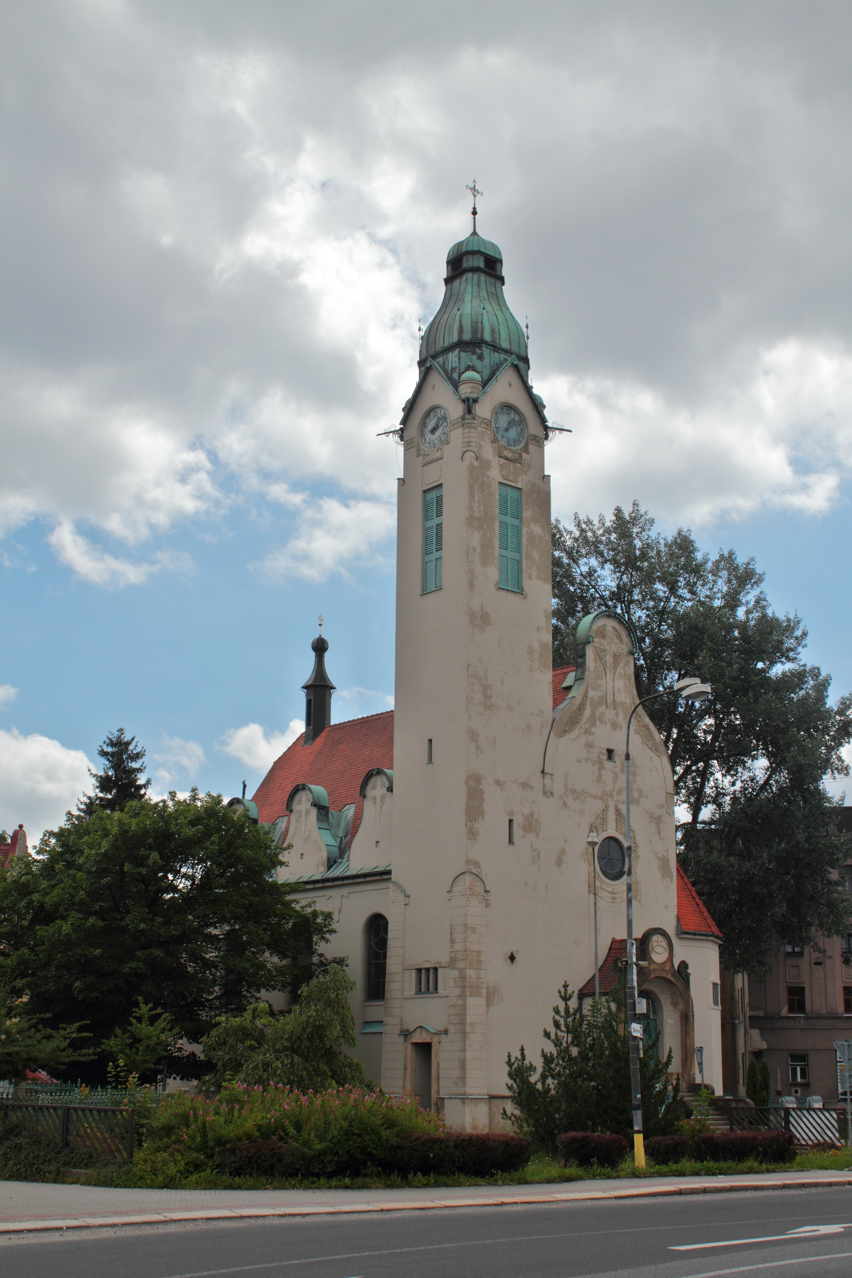 Starokatolický kostel Povýšení svatého Kříže, Jablonec nad Nisou